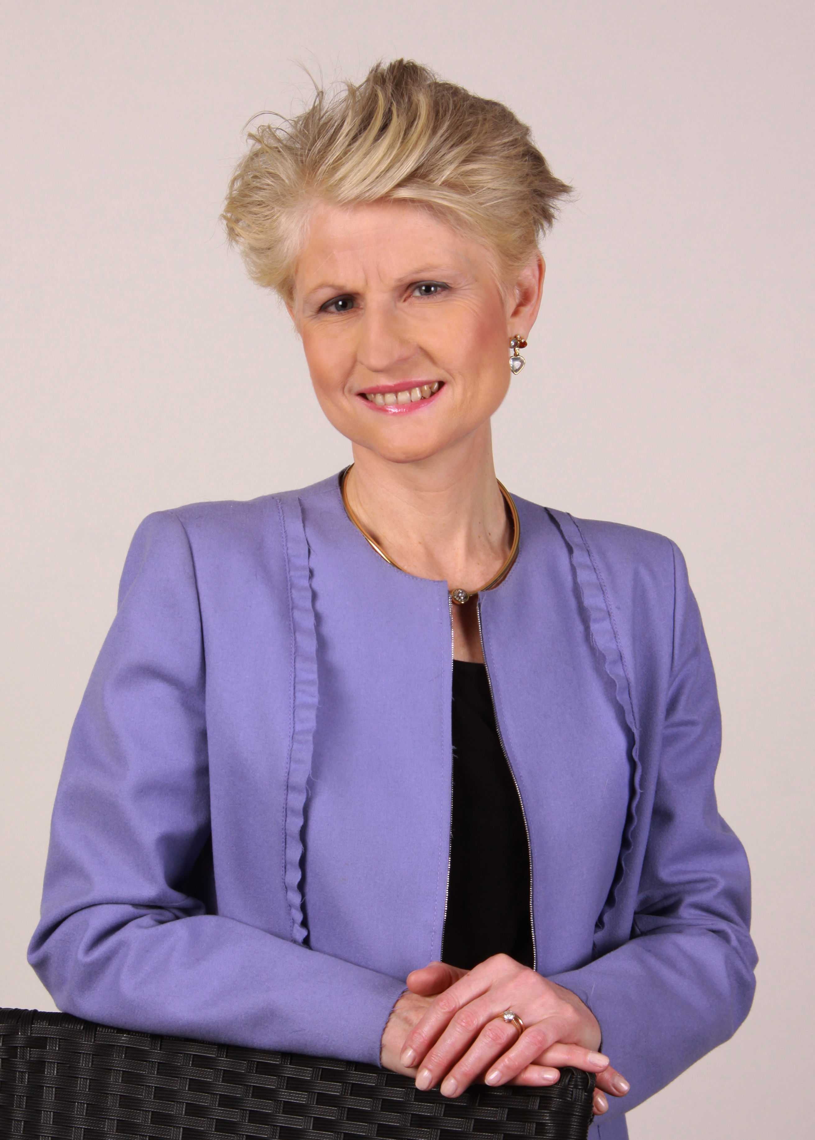 Abgeordnete/r Europaparlament